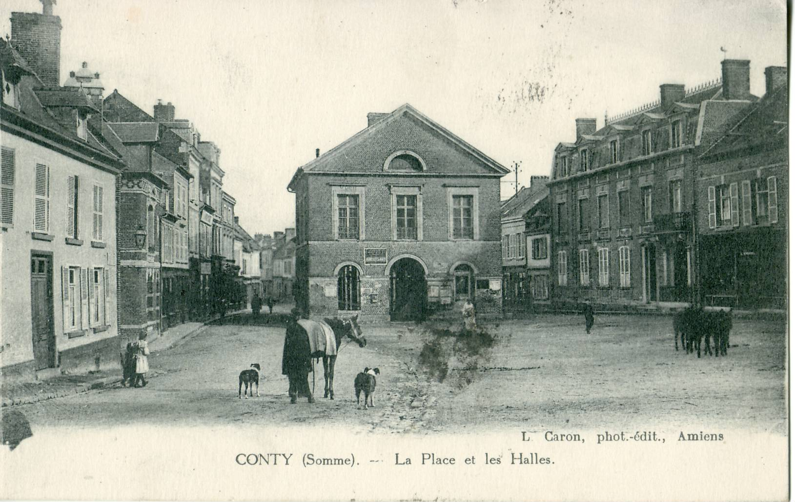 Carte postale ancienne éditée par Caron CONTY : La Place et les Halles